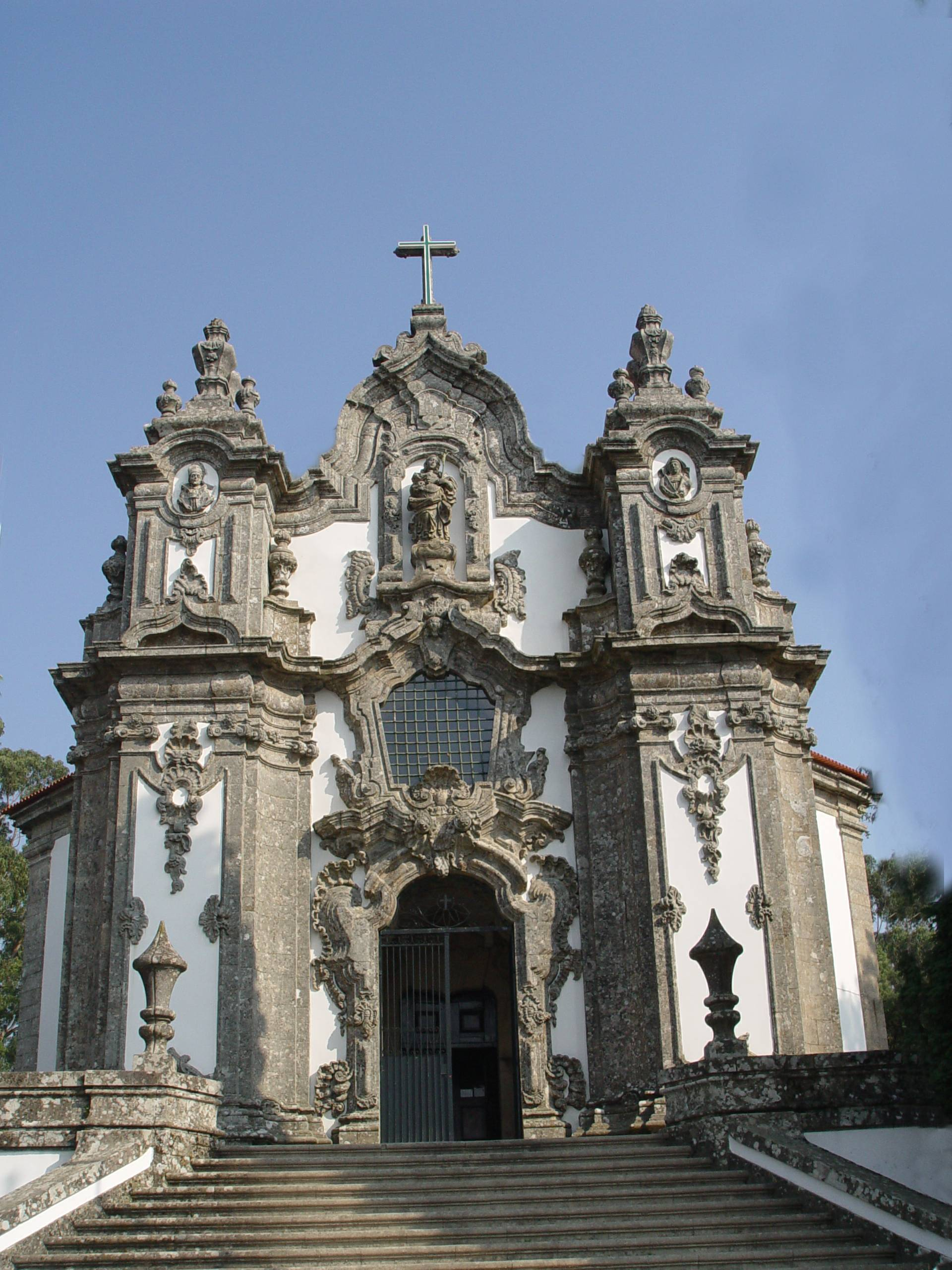 A Igreja de Santa Maria Madalena, de estilo rocaille, situa-se em Braga, Portugal.